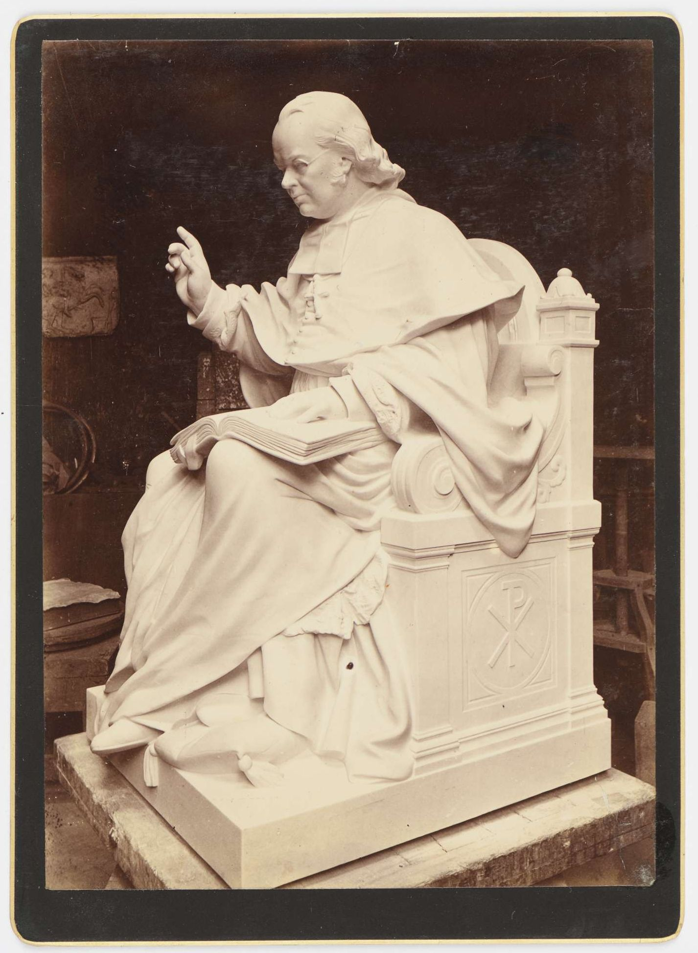 Monument à la mémoire de m[onsei]g[neu]r David, évêque de Saint-Brieuc : vue rapprochée de trois quart de la statue de l'évêque assis et bénissant. Mention manuscrite à l’encre noire sur un papier collé au verso : H. Chapu / Statue de Mgr David Cathédral de St-Brieuc / Monument inauguré le 4 mai 1891. Échelle : 10 cm / 1 m. Photographie issue des dossiers de travaux de restauration des cathédrales (1802-1912, conservés aux Archives nationales (inventaire et documents numérisés consultables en ligne).